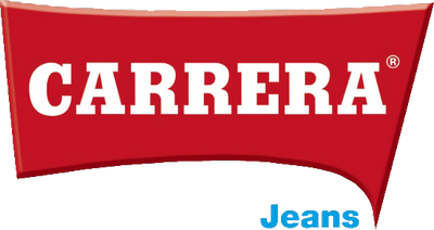 Логотип Carrera S.p.A. Все права защищены!